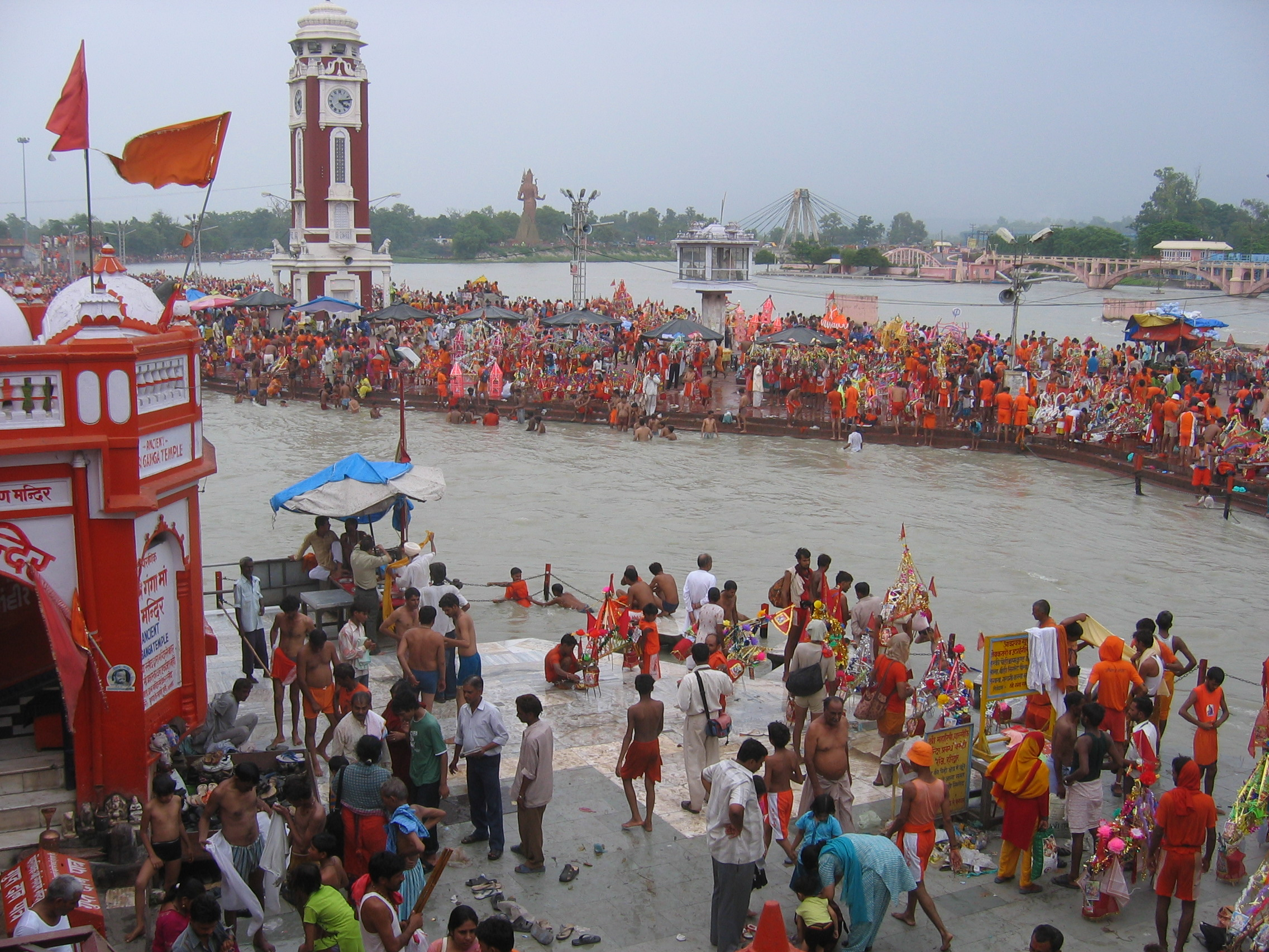 le ghat de Haridwar en milieu d'aprés-midi